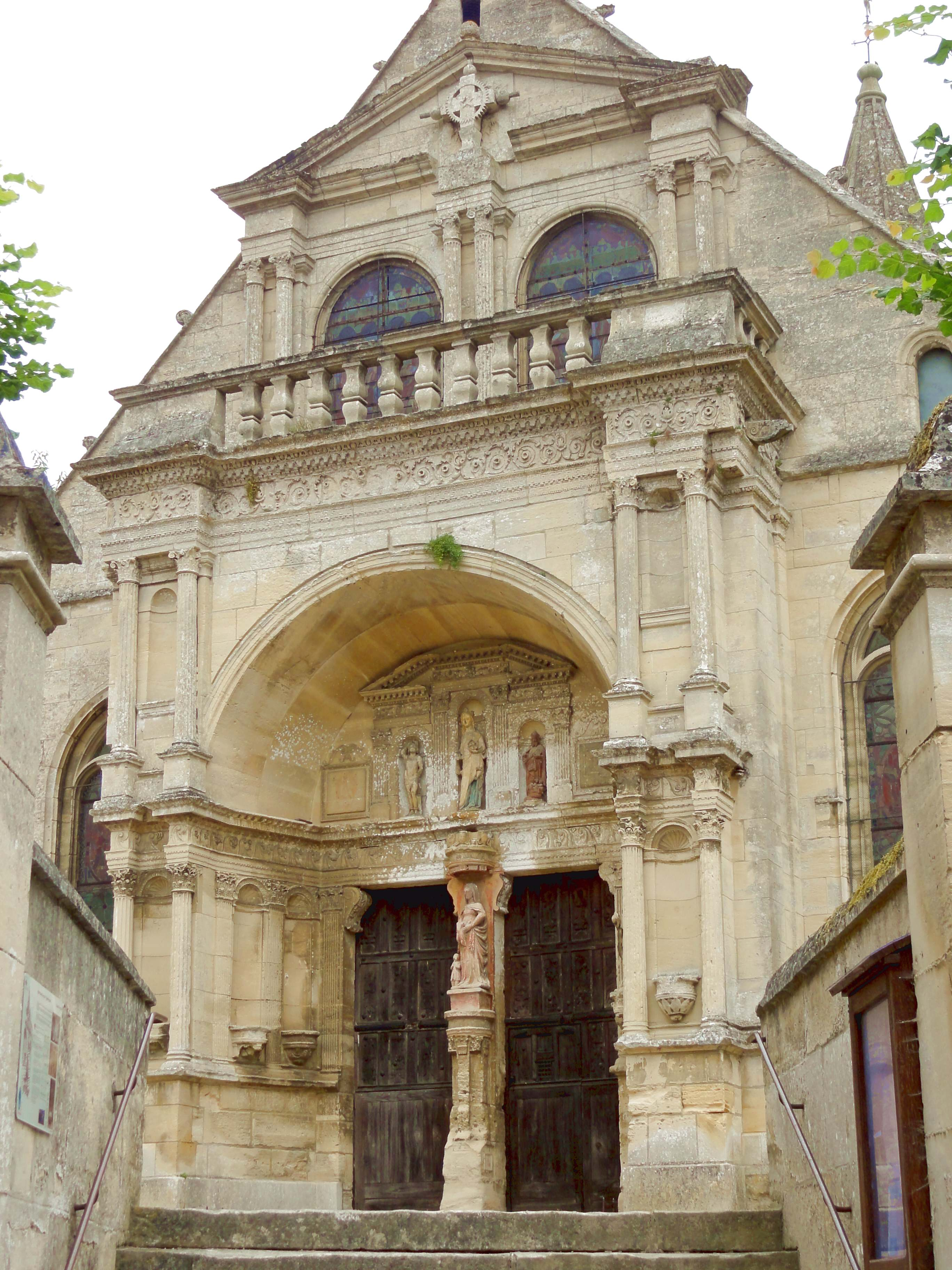 Église Saint-Gervais-et-Saint-Protais de Saint-Gervais (voir titre).